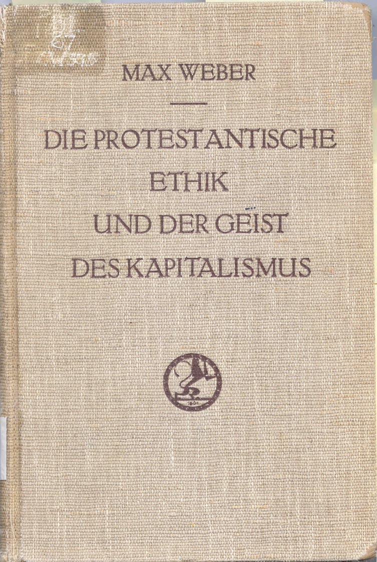 Cover of the "Sonderausgabe" 1934 edition of Die protestantische Ethik und der 'Geist' des Kapitalismus